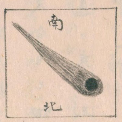 亦三郎（桂井素庵）の日記（写本）に描かれた寛文四年の彗星